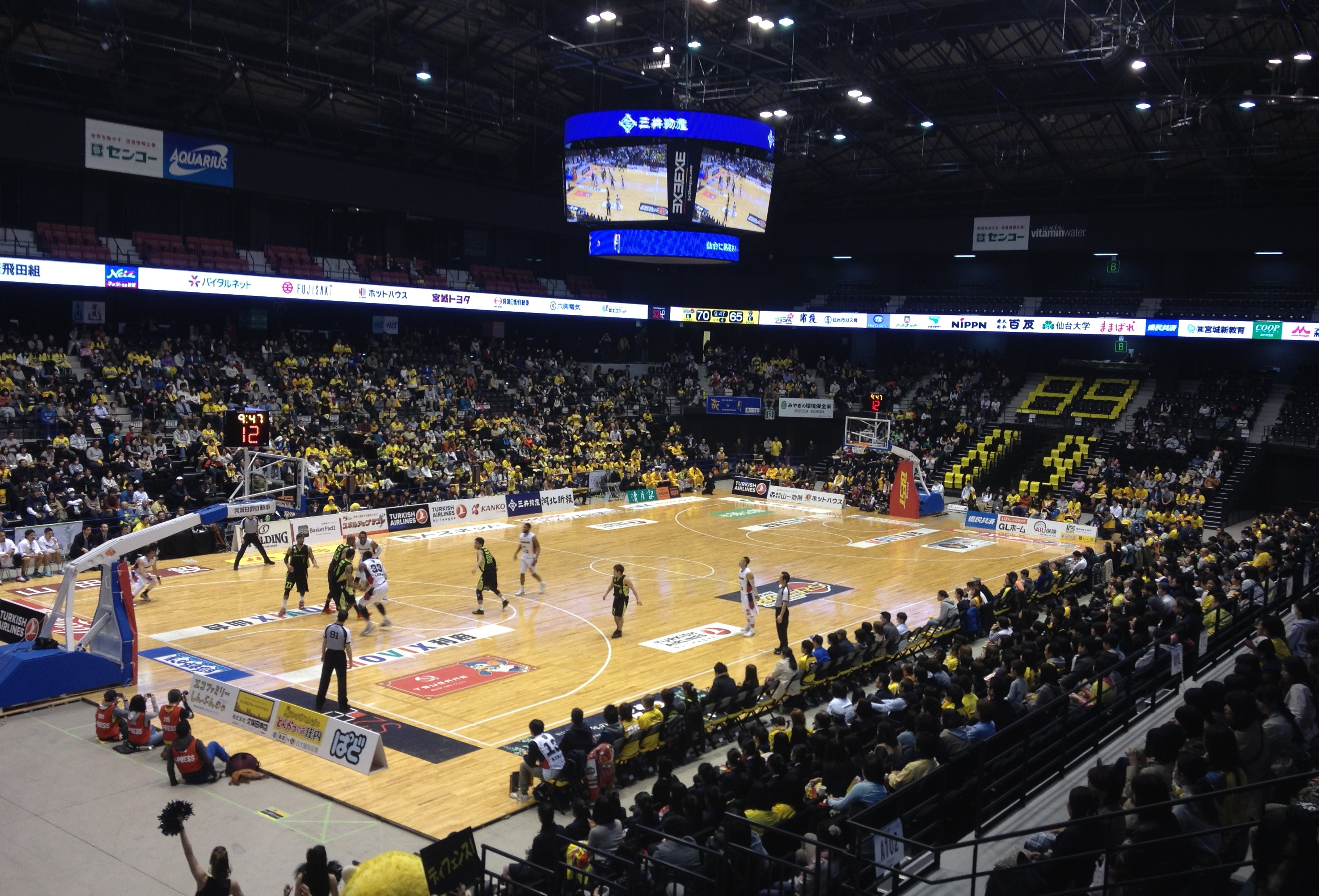 bjリーグ 東地区 リーグ戦・仙台89ERS vs 横浜ビー・コルセアーズ ゼビオアリーナ仙台（2015年3月）